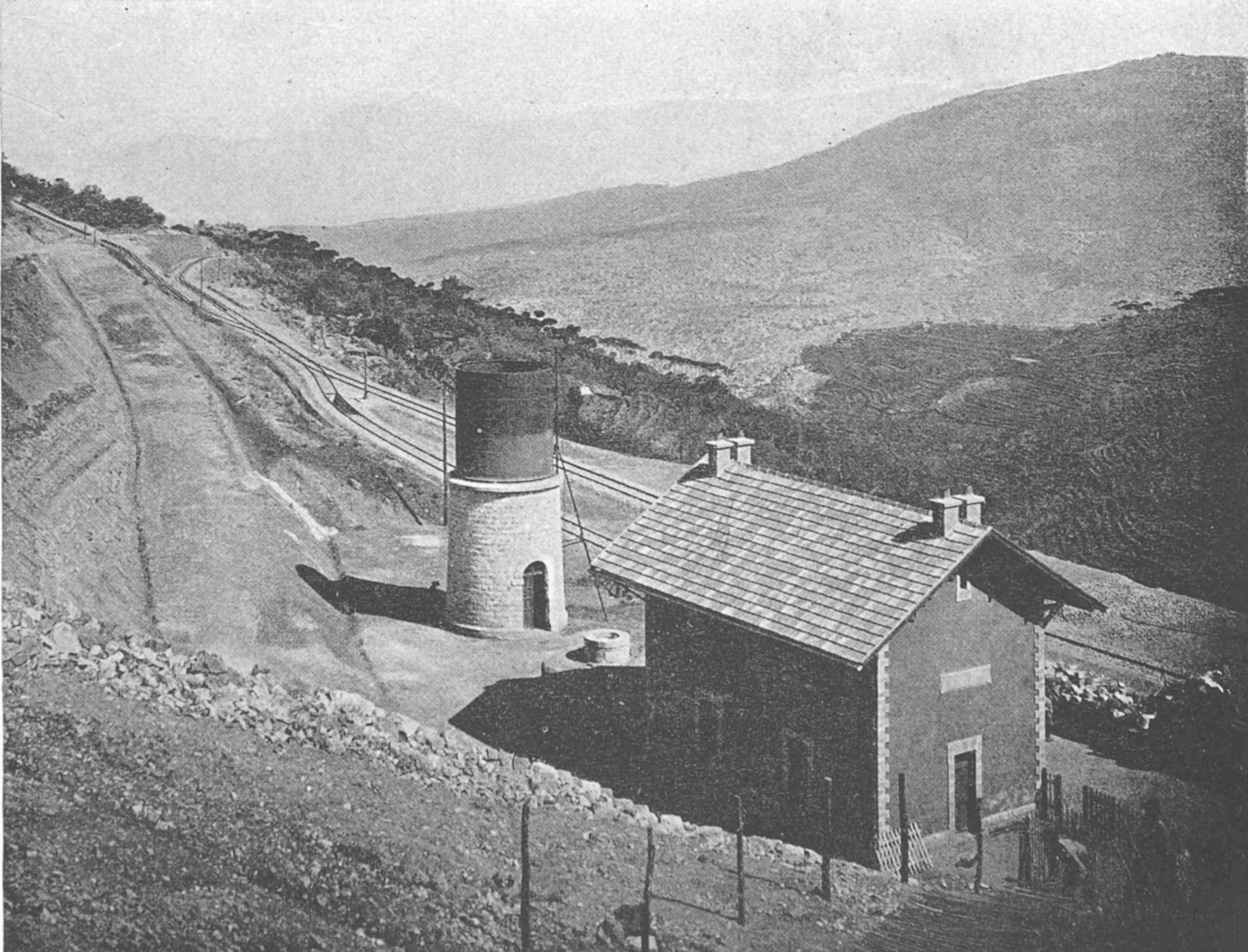 Station de rebroussement d'Araya